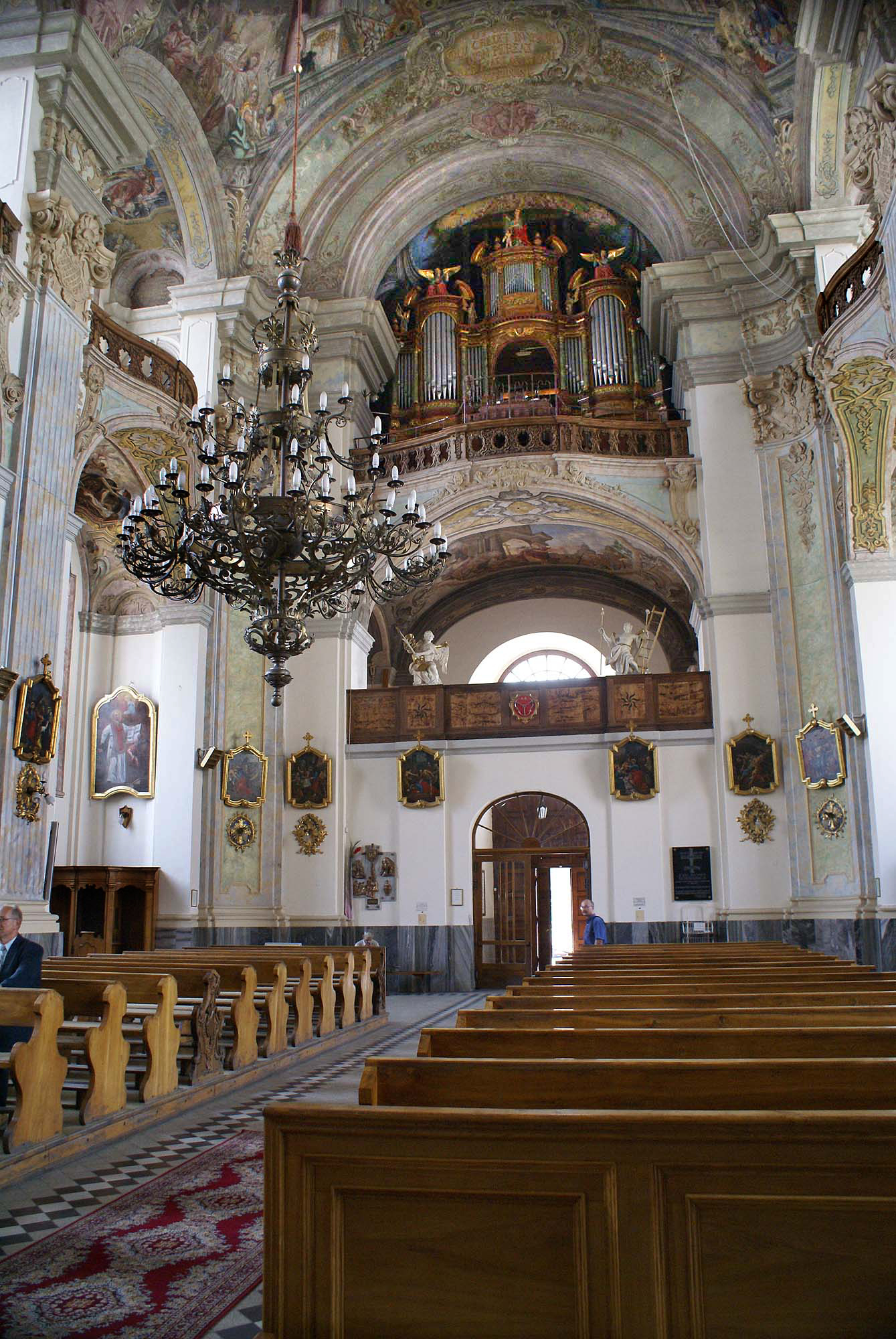 Brzeg, kościół klasztorny jezuitów, ob. par. p.w. Św. Krzyża, 1734, 1856